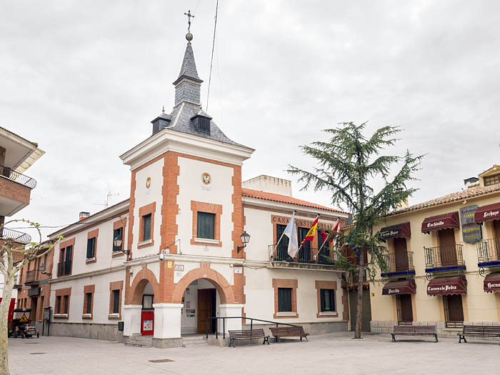 Ayuntamiento. Pueblo de Fuente el Saz del Jarama. Cuenca del Medio Jarama. Madrid. España.